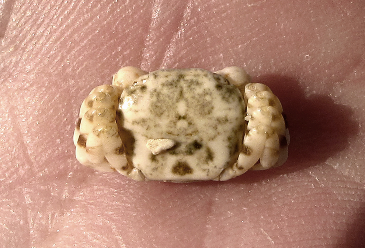 Le crabe Pseudograpsus albus à la Réunion.